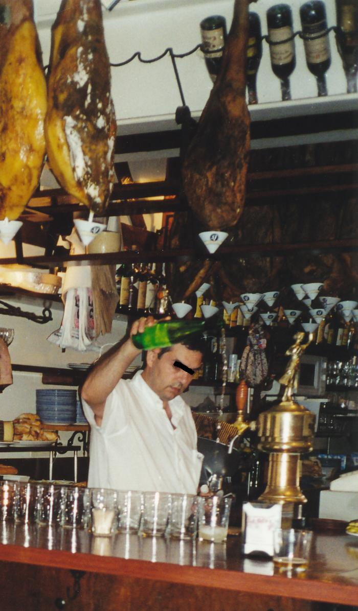 Txakoli-Ausschank in einer Altstadtbar von San Sebastian (Donostia) Datum: 10/2000 Urheber: Michael Pfeiffer Quelle: privates Fotoalbum des Urhebers Hinweis: Person wurde anonymisiert